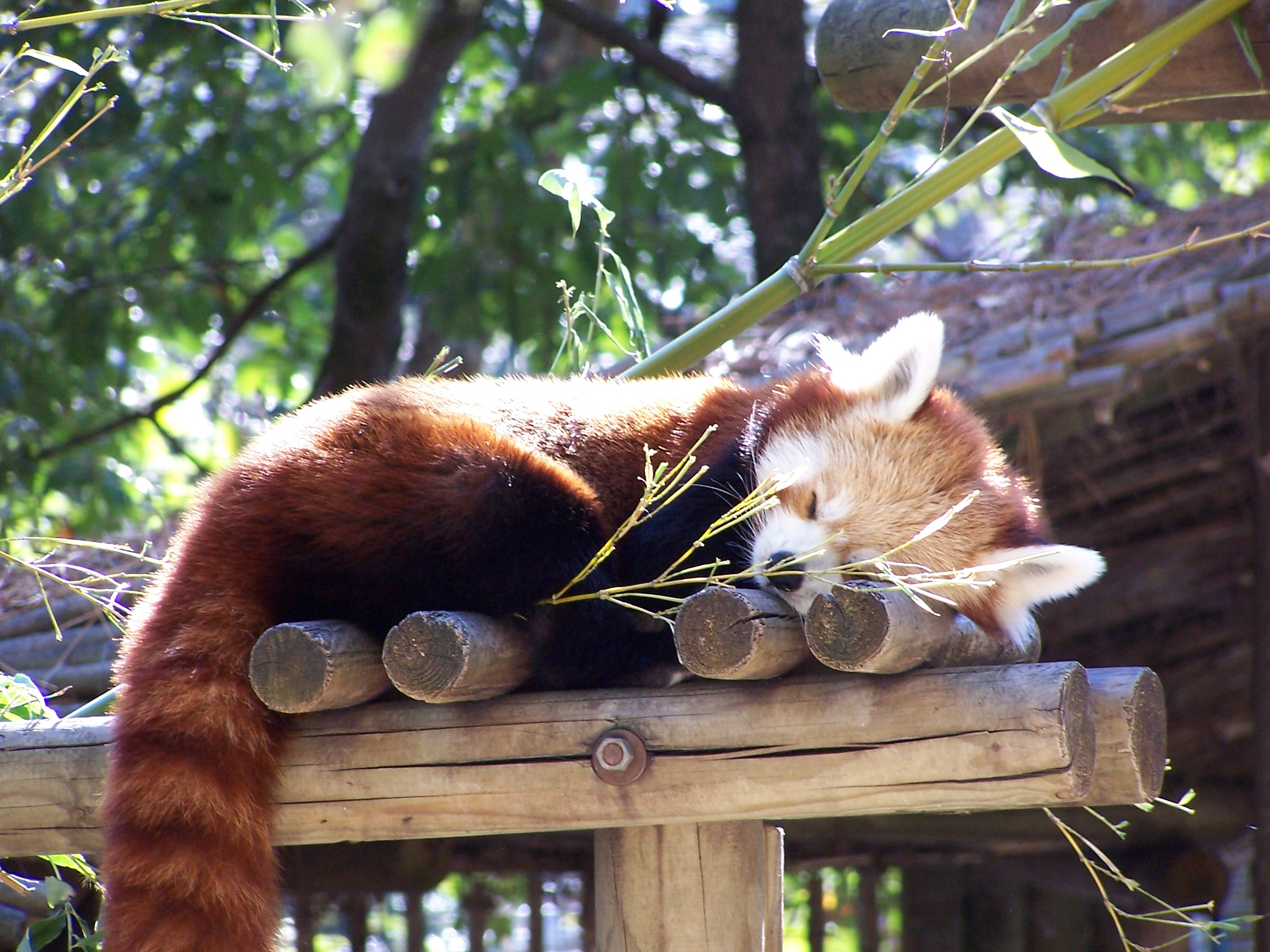 Photographie d'un petit panda (Ailurus fulgens fulgens) prise au Zoo de la Palmyre. Le petit panda est un mammifère principalement végétarien originaire de l'Himalaya et de la Chine méridionale. Son aire de répartition est vaste : elle couvre à l'ouest certaines parties de l'Himalaya (Népal, Bhoutan et Tibet) et, à l'est, le nord de la Birmanie et les provinces chinoises du Sichuan et du Yunnan. À l'instar des pandas géants avec lesquels ils partagent de nombreux territoires, les petits pandas mangent de grandes quantités de bambous, mais leur régime alimentaire comprend également des fruits, des racines, des glands et du lichen. Ces animaux paisibles sont d'excellents grimpeurs qui s'alimentent en grande partie dans les arbres, et passent la plupart de leur temps à manger et dormir. L'espèce est actuellement en danger, en grande partie en raison de la réduction de son habitat, mais aussi à cause d'un important braconnage. Elle figure sur la liste rouge de l'Union internationale pour la conservation de la nature (IUCN).